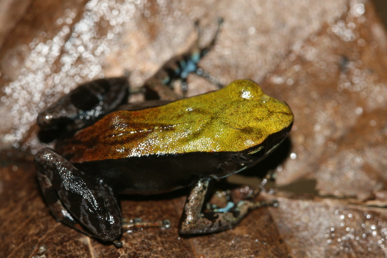 Mantella ebenaui